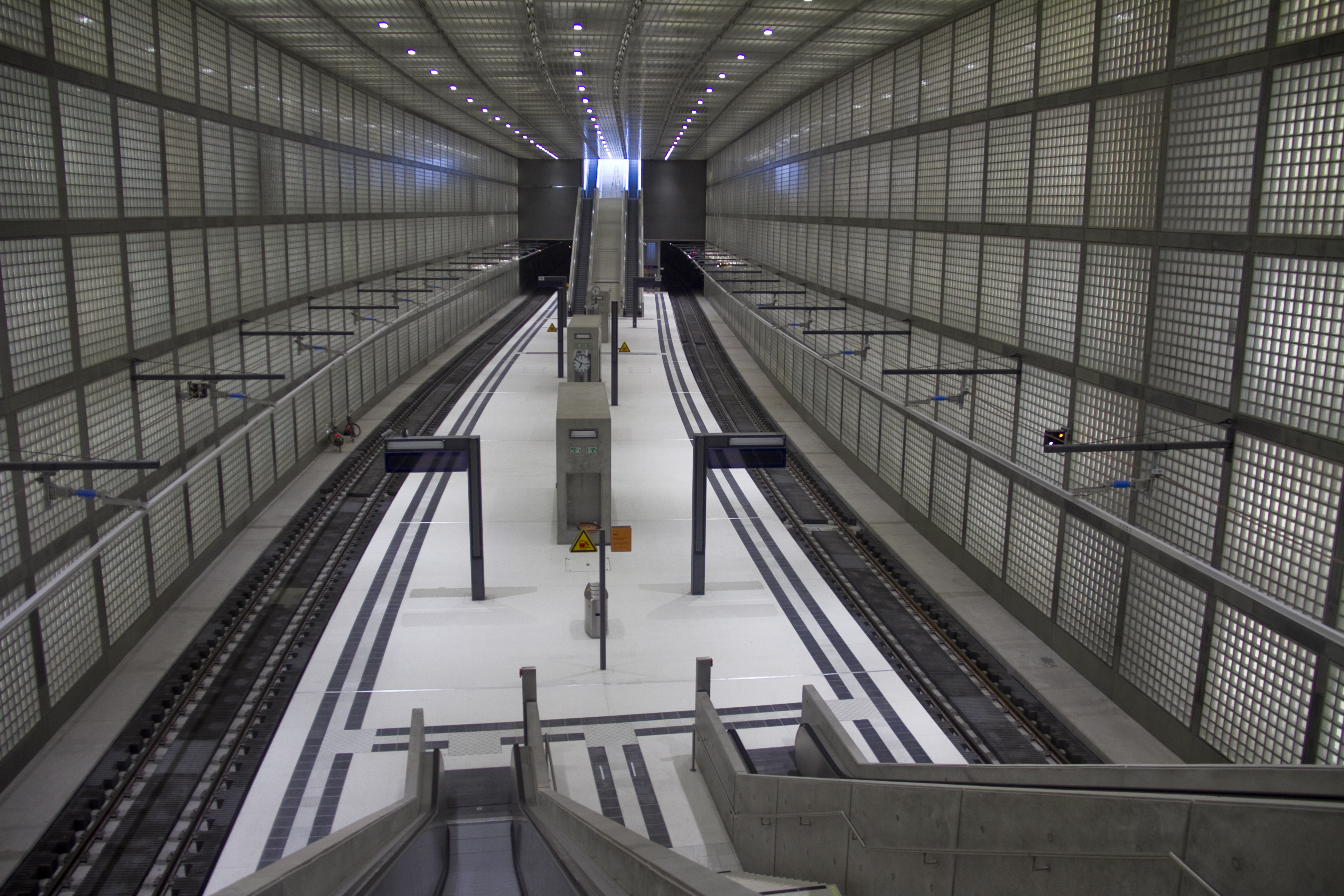 City-Tunnel Leipzig, Station Wilhelm-Leuschner-Platz